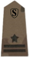 Major ZS